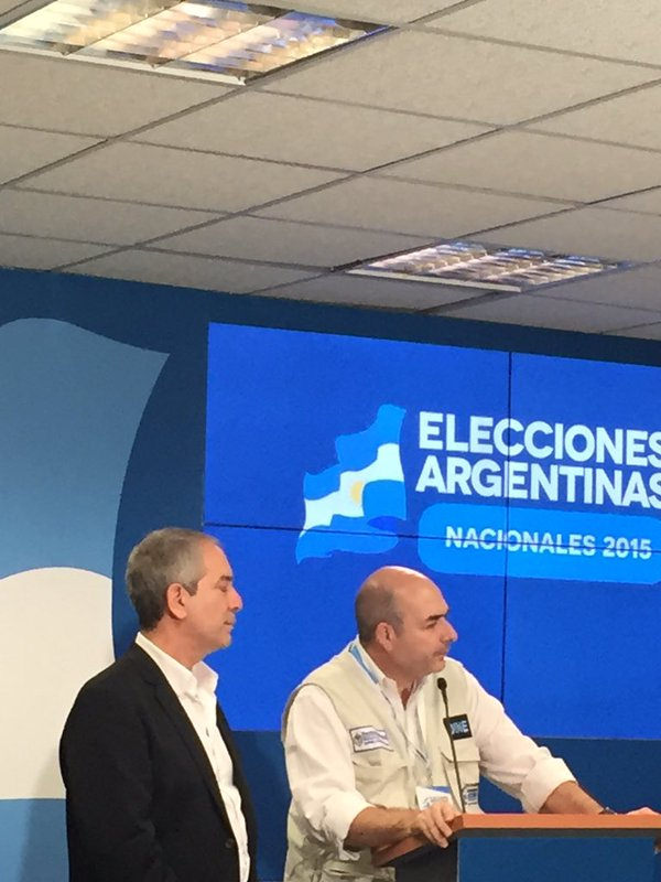 23.59PM Tullio anuncia que vienen los resultados